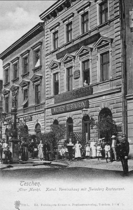 Old Town in Cieszyn